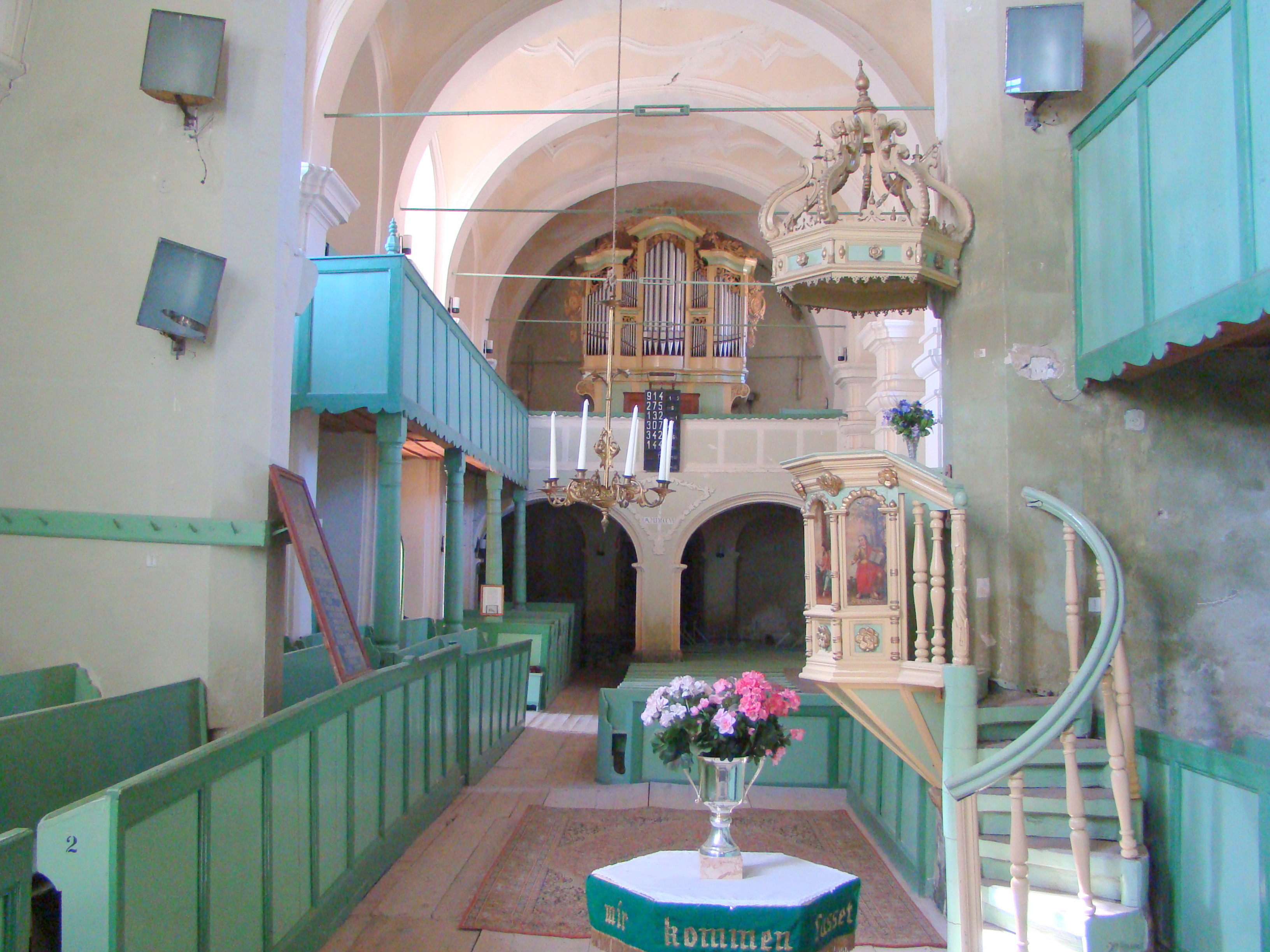 Biserica evanghelică fortificată, sat Șoarș; comuna Șoarș 282 sec. XV - XVI, 1806